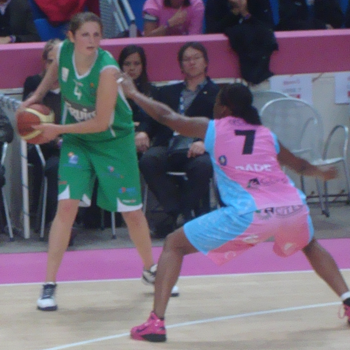 La basketteuse allemande Romy Bär (balle en mains) et la basketteuse française Krissy Bade (en défense)